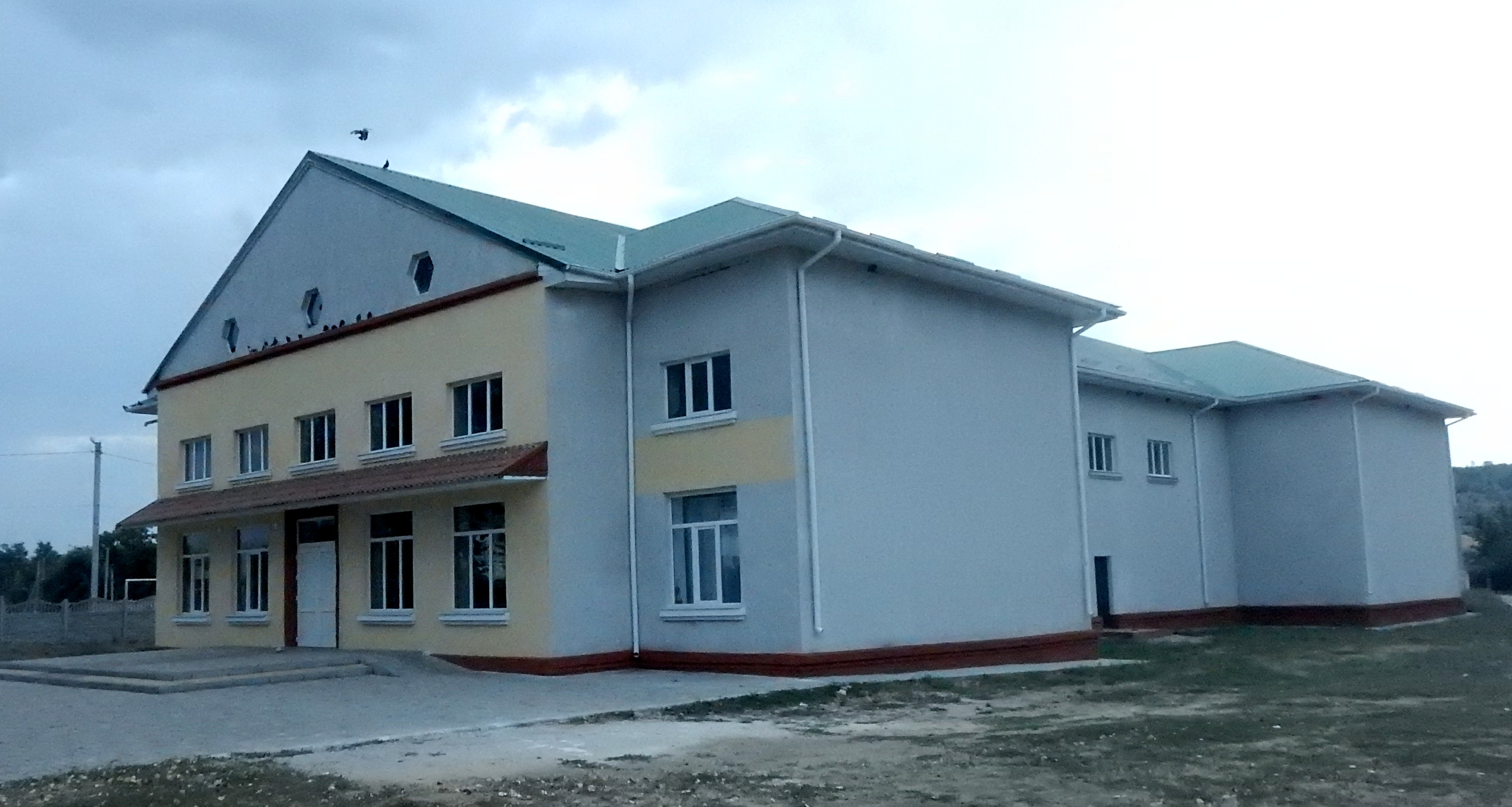 Будинок культури у селі Новопетрівка, Великомихайлівський район, Одеська область. Вікіекспедиція на Північ Одещини